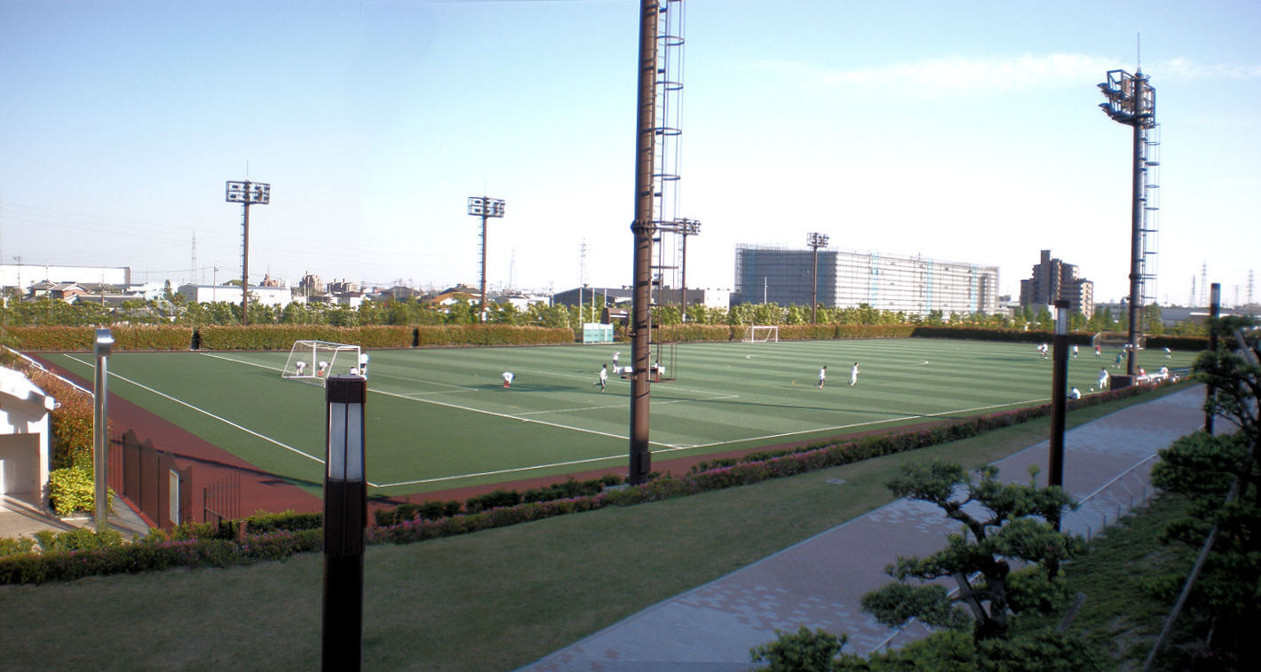 愛知県小牧市にある小牧市スポーツ公園